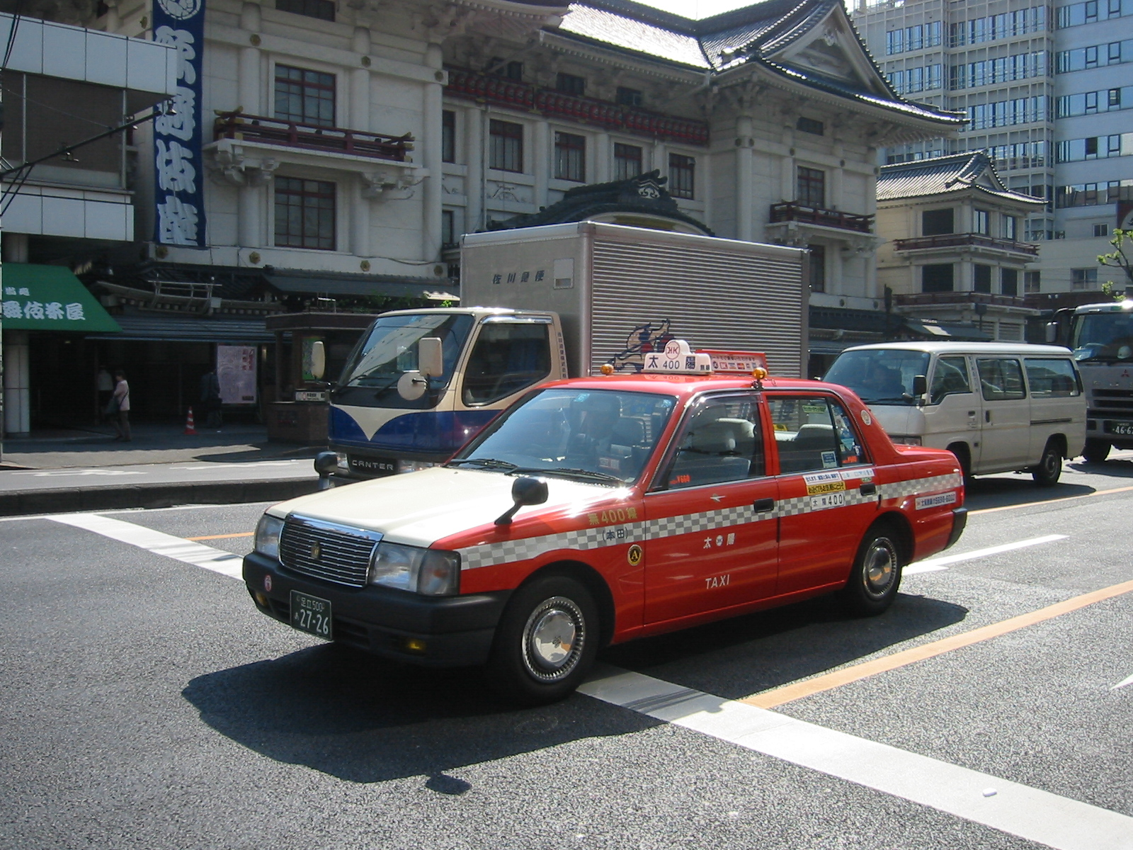 Taiyo taxi.